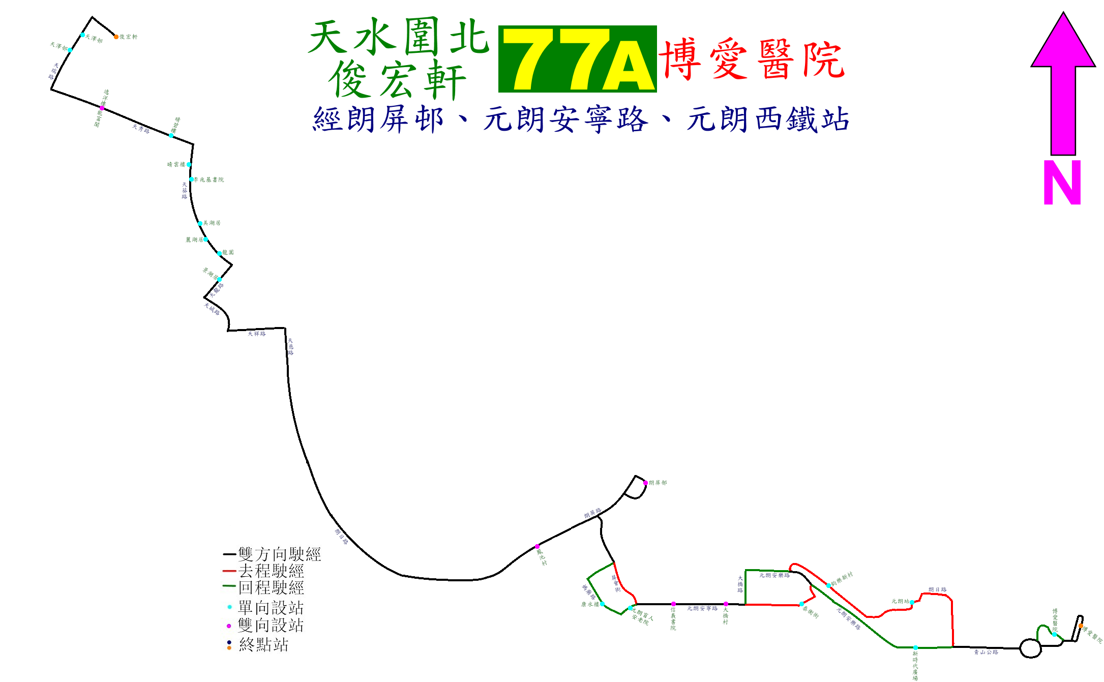 中文（香港）: 新界專線小巴77A線的走線圖